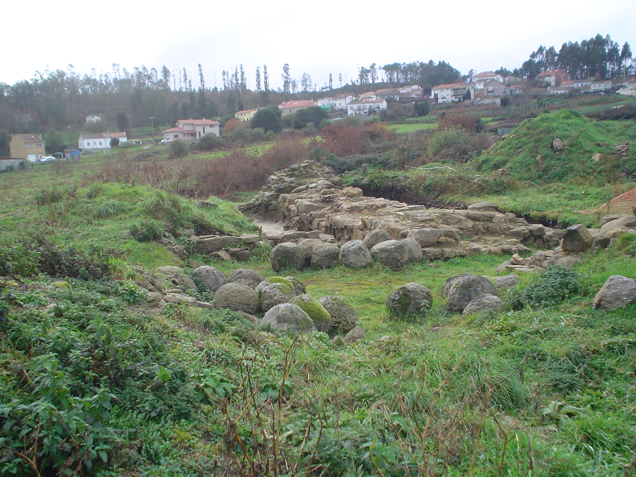 Castelo da Rocha forte. Conxo - Santiago. Porta de aceso a fortaleza.